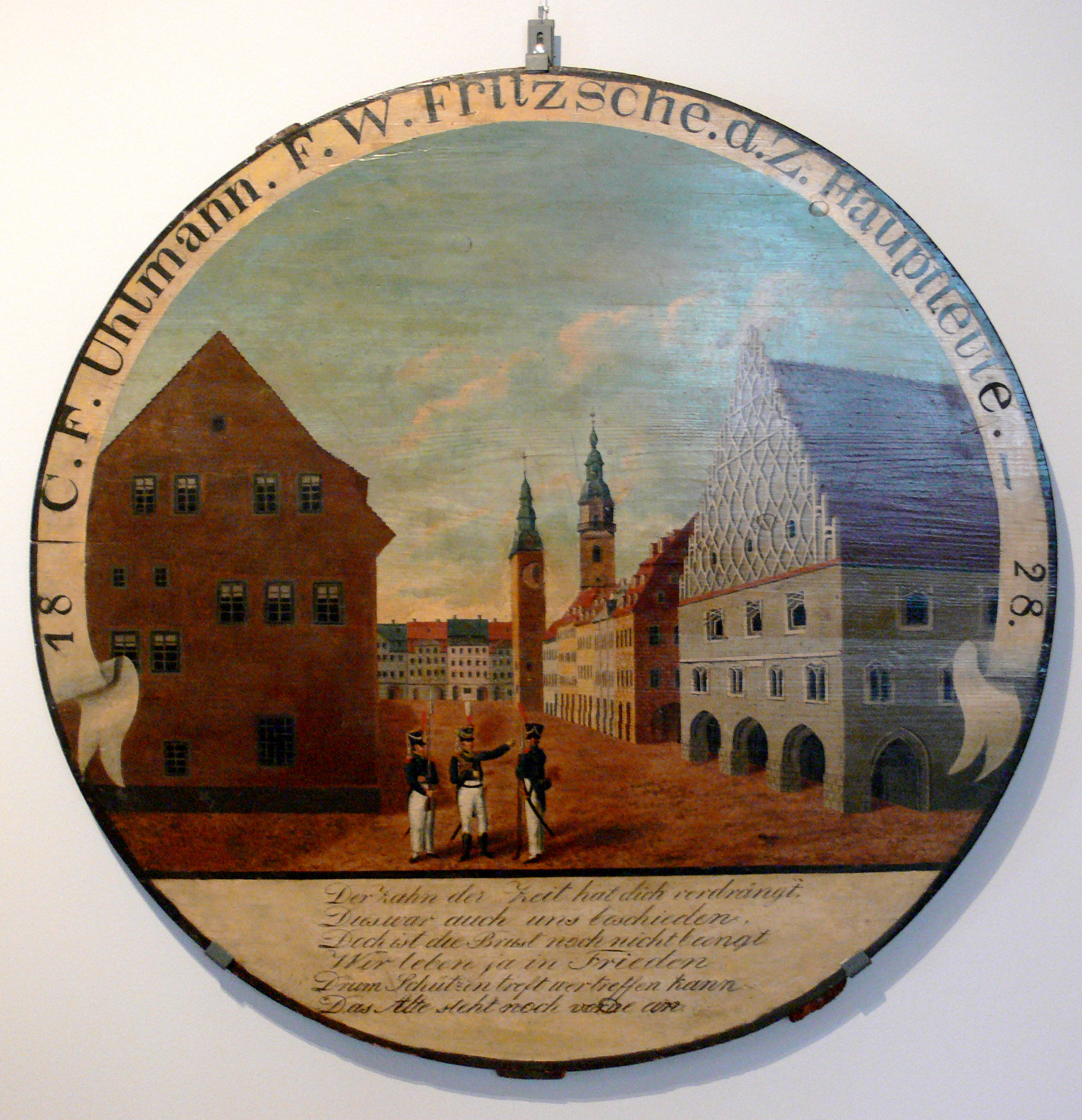 Schützenscheibe von 1828 mit Ansicht von Chemnitz Schloßbergmuseum Chemnitz